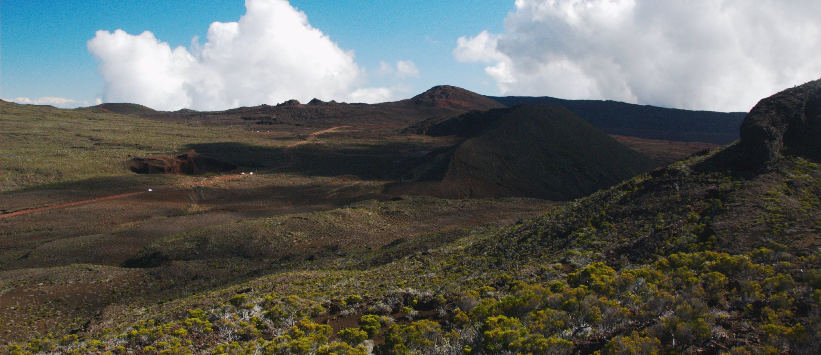 Site du parc national de La Reunion. Site exclu du classement au patrimoine de l'UNESCO